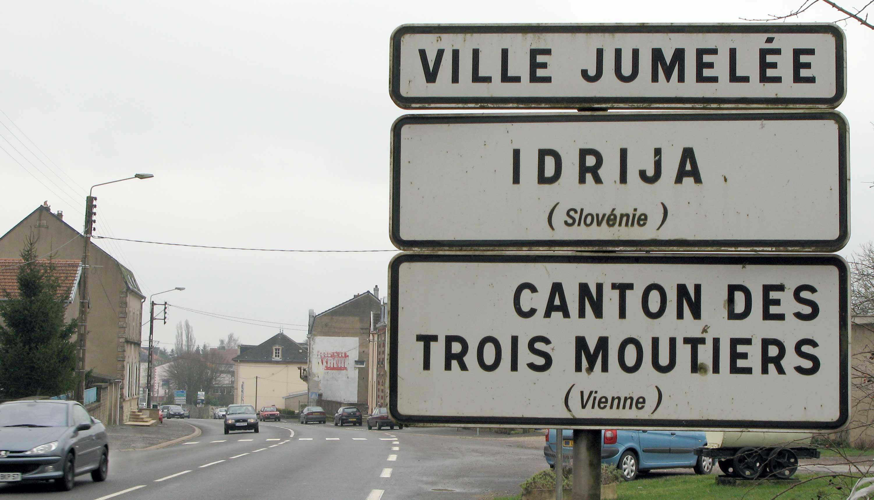 Aumetz Jumelagen